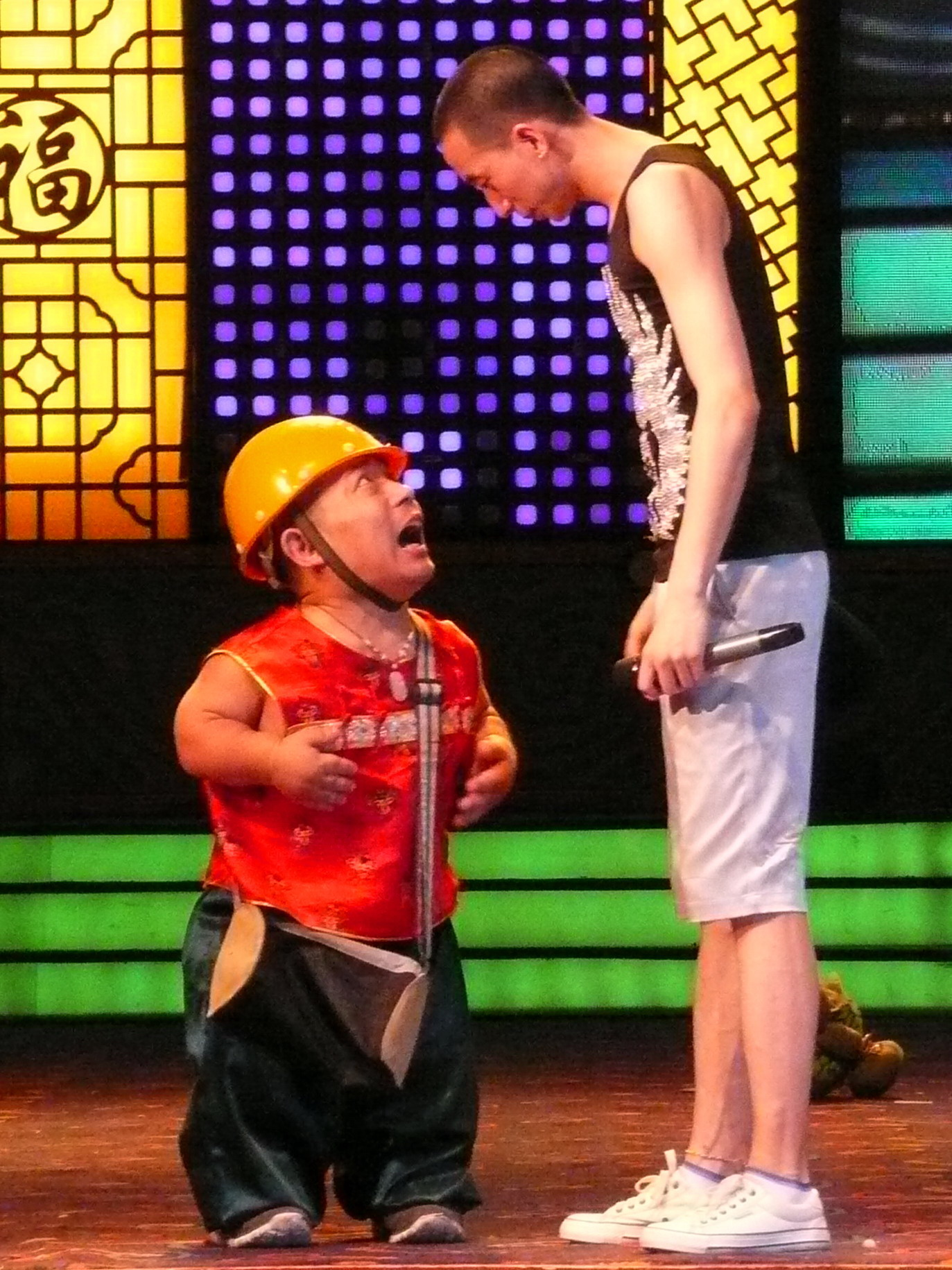 Dongbeilang Errenzhuan 東北浪二人轉